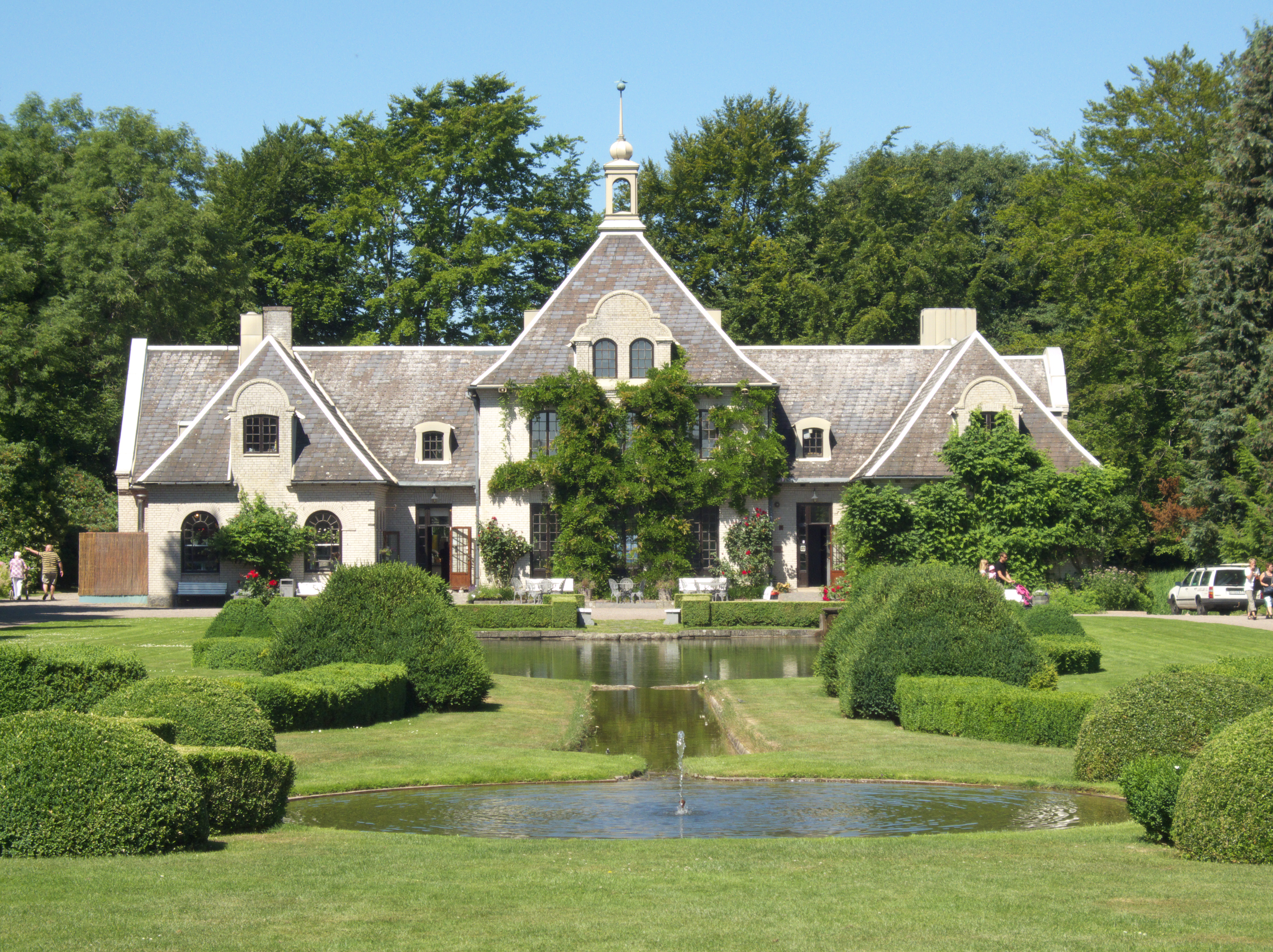 Norrvikens trädgårdar - barockträdgården och Villa Abelin